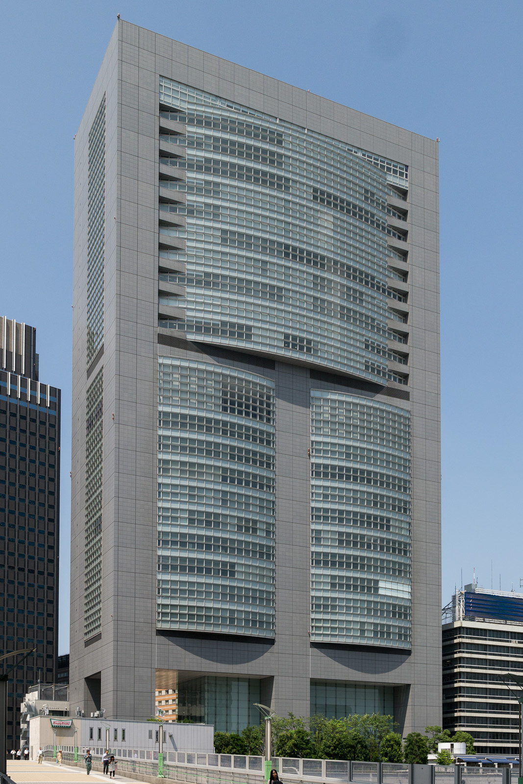 JR東日本本社ビル、東京都渋谷区代々木。